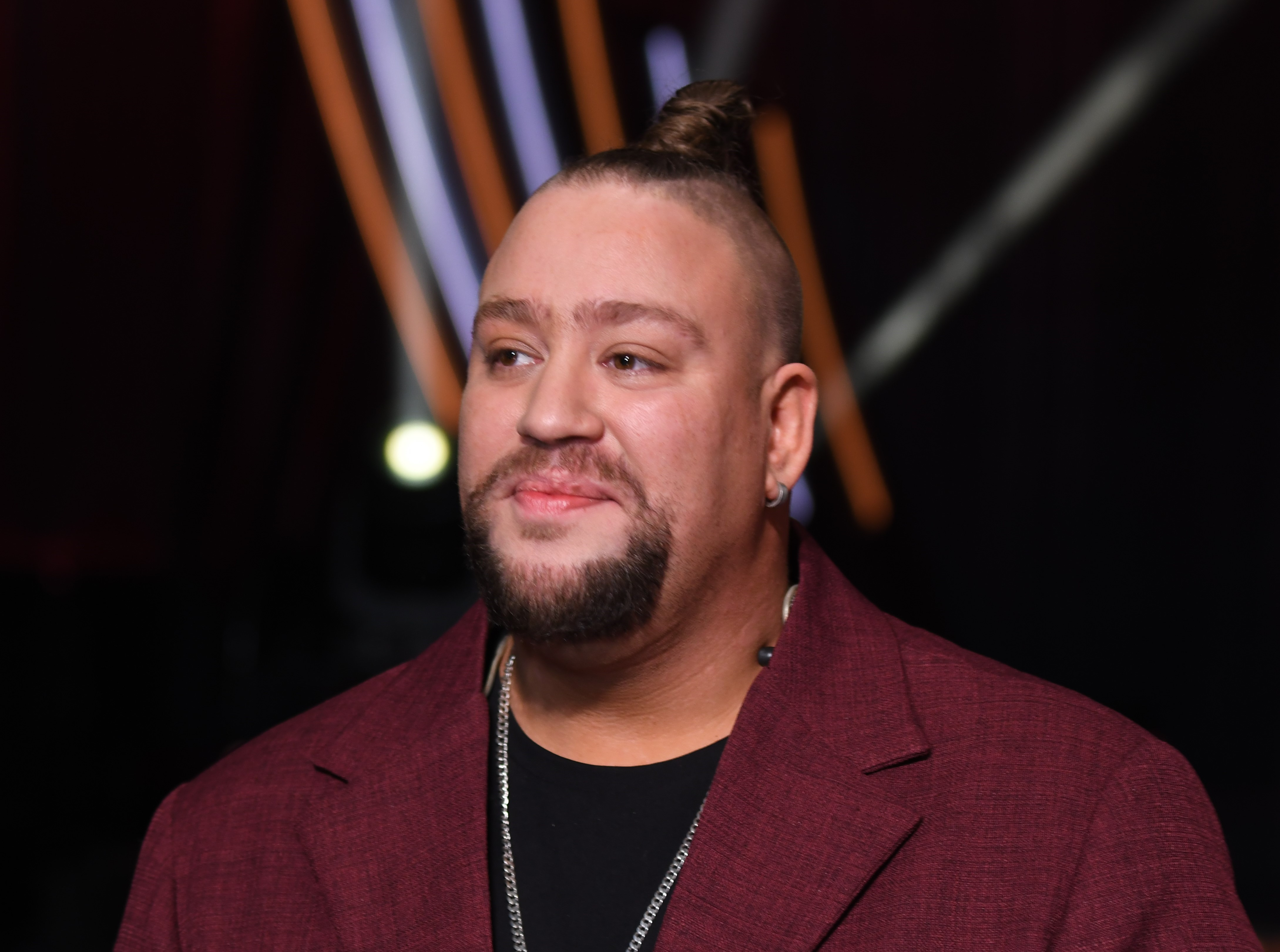 Melodifestivalen 2019, deltävling 1, Scandinavium, Göteborg, Nano